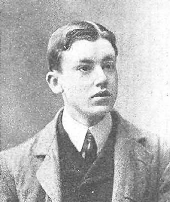 Tomás Sancha Lengo, fotografía de Compañy, en la revista Nuevo Mundo.